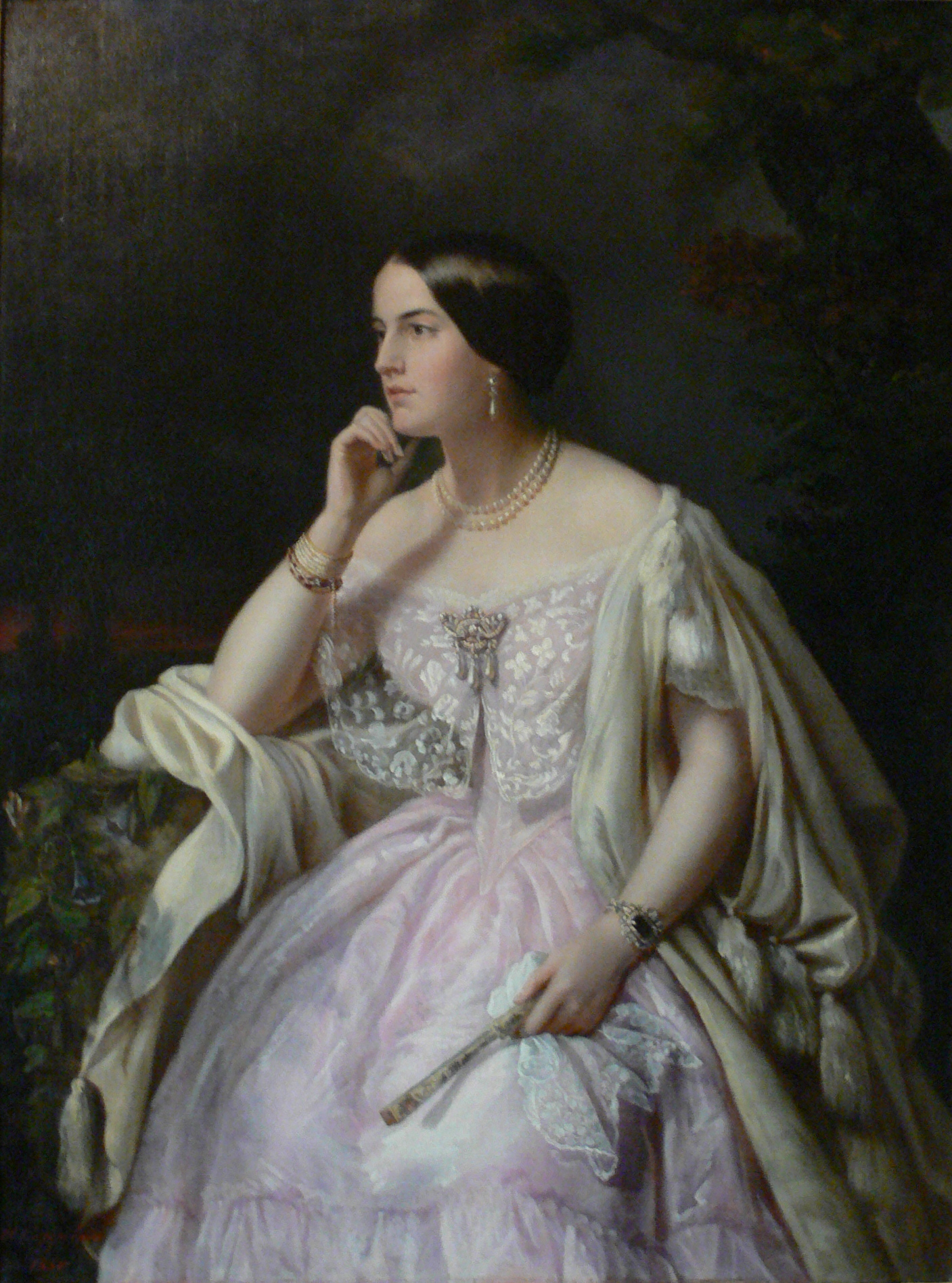 épouse Trelawny, comtesse de Beauregard, dite Miss Harryet-Howard